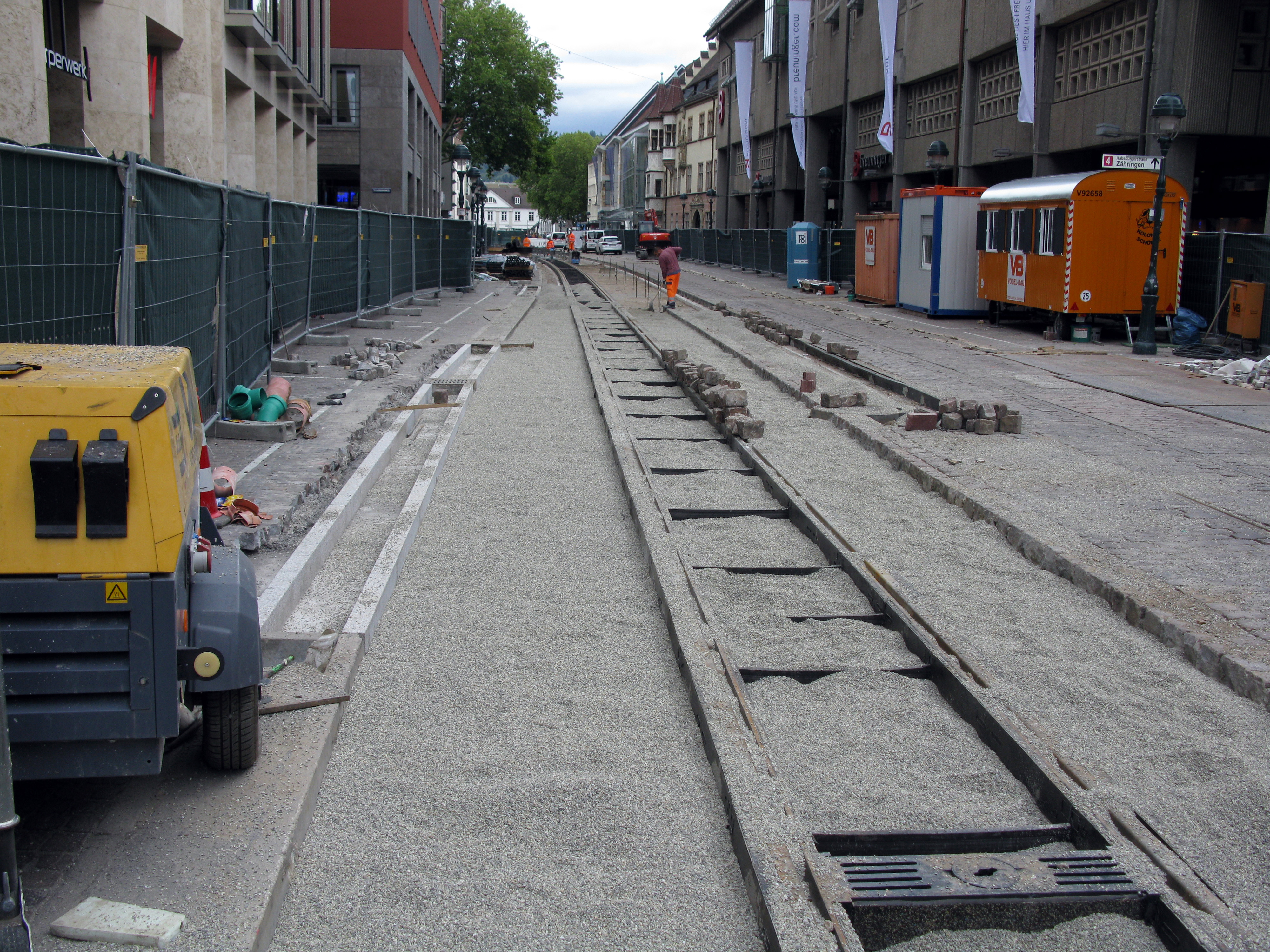 Gleiserneuerung auf der Freiburger Kaiser-Joseph-Straße. Hier an der Einmündung der Münsterstraße stand bis 1938 der Fischbrunnen zwischen den Gleisen, die bis 2017 einen kleinen Bogen machten, der heute noch am Verlauf des Bächles auf der linken Seite zu sehen ist.